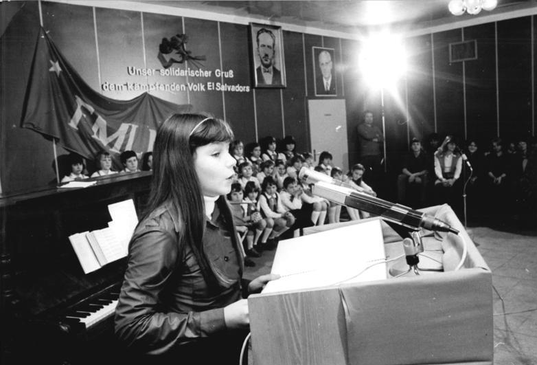 ADN-ZB Lehmann-26.1.1982-pe-Bez. Halle: Ihre leidenschaftliche Anteilnahme am gerechten Befreiungskampf der salvadorianischen Patrioten bekundeten während eines Meetings in Sandersdorf (Kreis Bitterfeld) über 200 Bürger. Sie nahmen einmütig eine Willenserklärung an, die die Schülerin Cordelia Salber verlas.